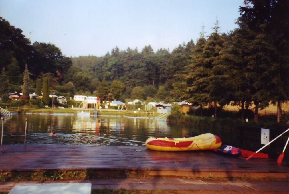 la natura naĝejo de Lichtenberg, frumatene fotinto: Thomas Pusch